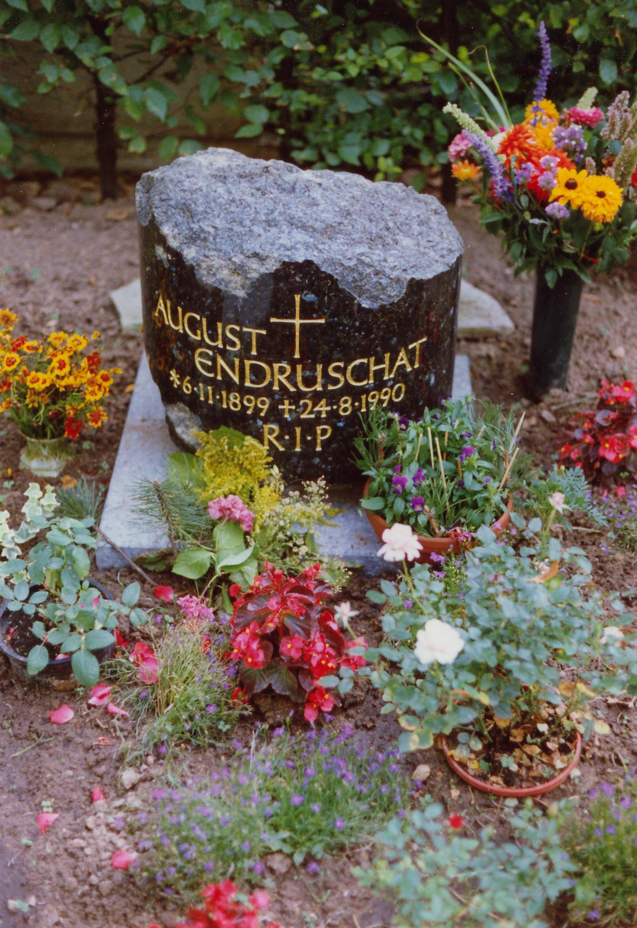 Grabstein des Kunstmalers August Endruschat, Friedhof Langestraße 7, Berlin-Lankwitz.